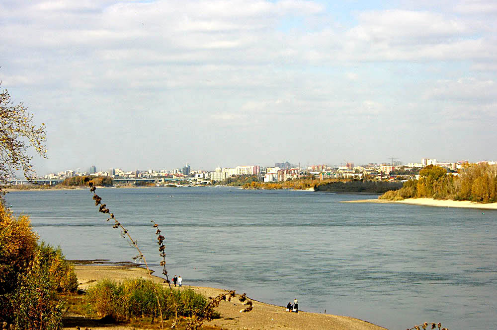 Новосибирск. Вид на правый берег с Северо-Чемского жилмассива